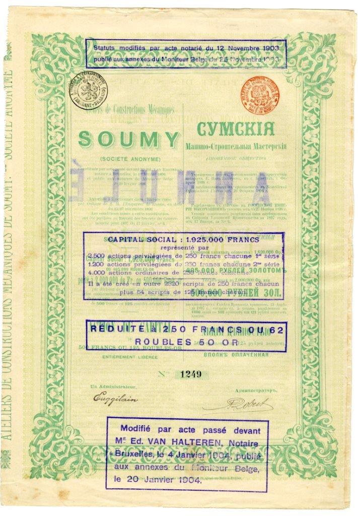 Акция ценностью в 500 франков или 125 руб. золотом Анонимного общества Сумских машиностроительных мастерских. Г. Брюссель, 1897 г.